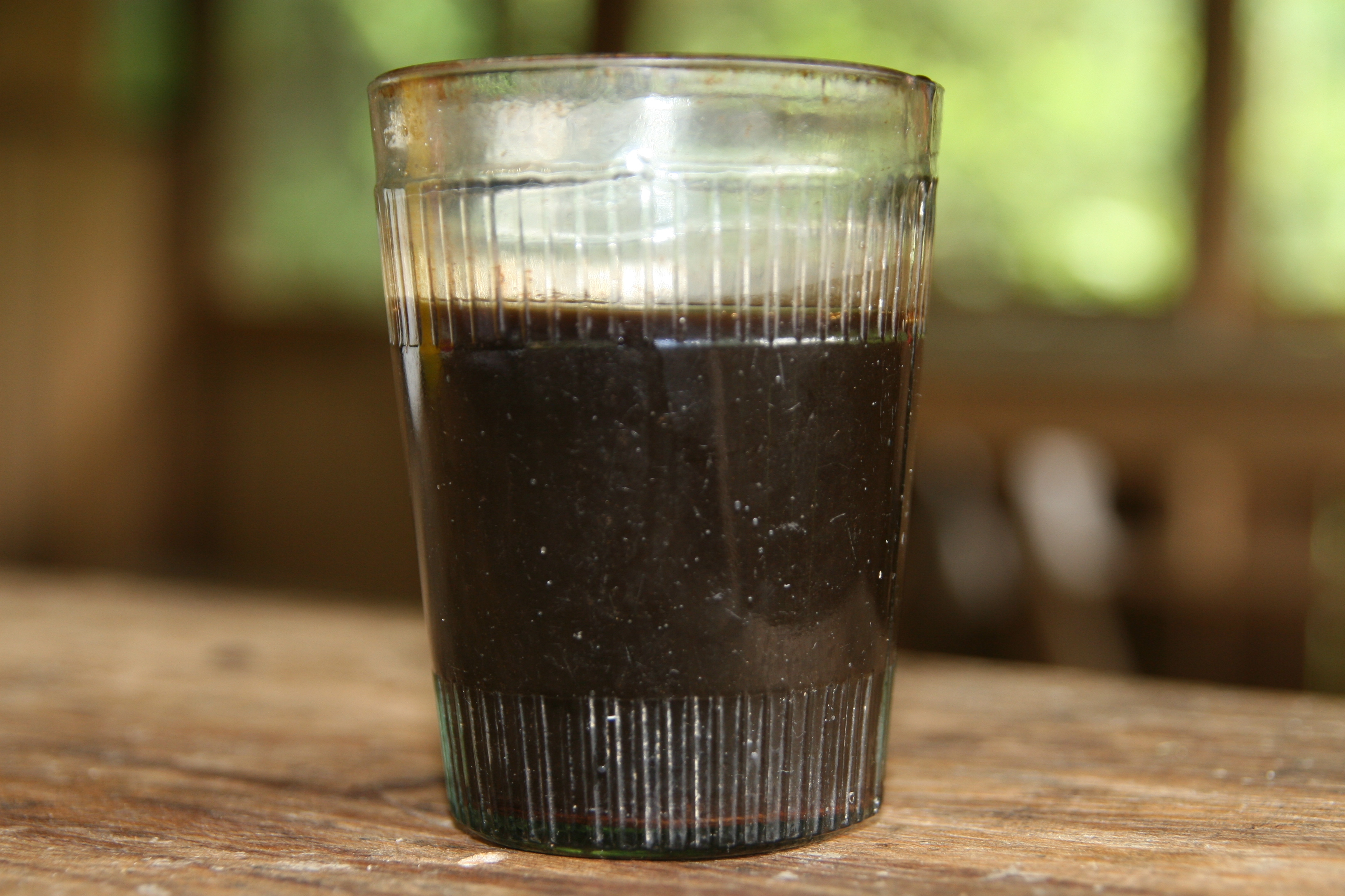 Decocción de mapacho (Nicotiana rustica) para ceremonia de purga de tabaco en el Centro Takiwasi, Tarapoto, Perú. El ritual de purga de tabaco es utilizado dentro de la medicina tradicional amazónica como una técnica depurativa.